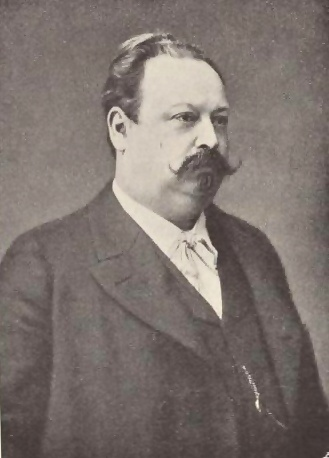 Ludwig Seitz (1844-1908), italienischer Kunstmaler und Galeriedirektor, deutscher Abstammung